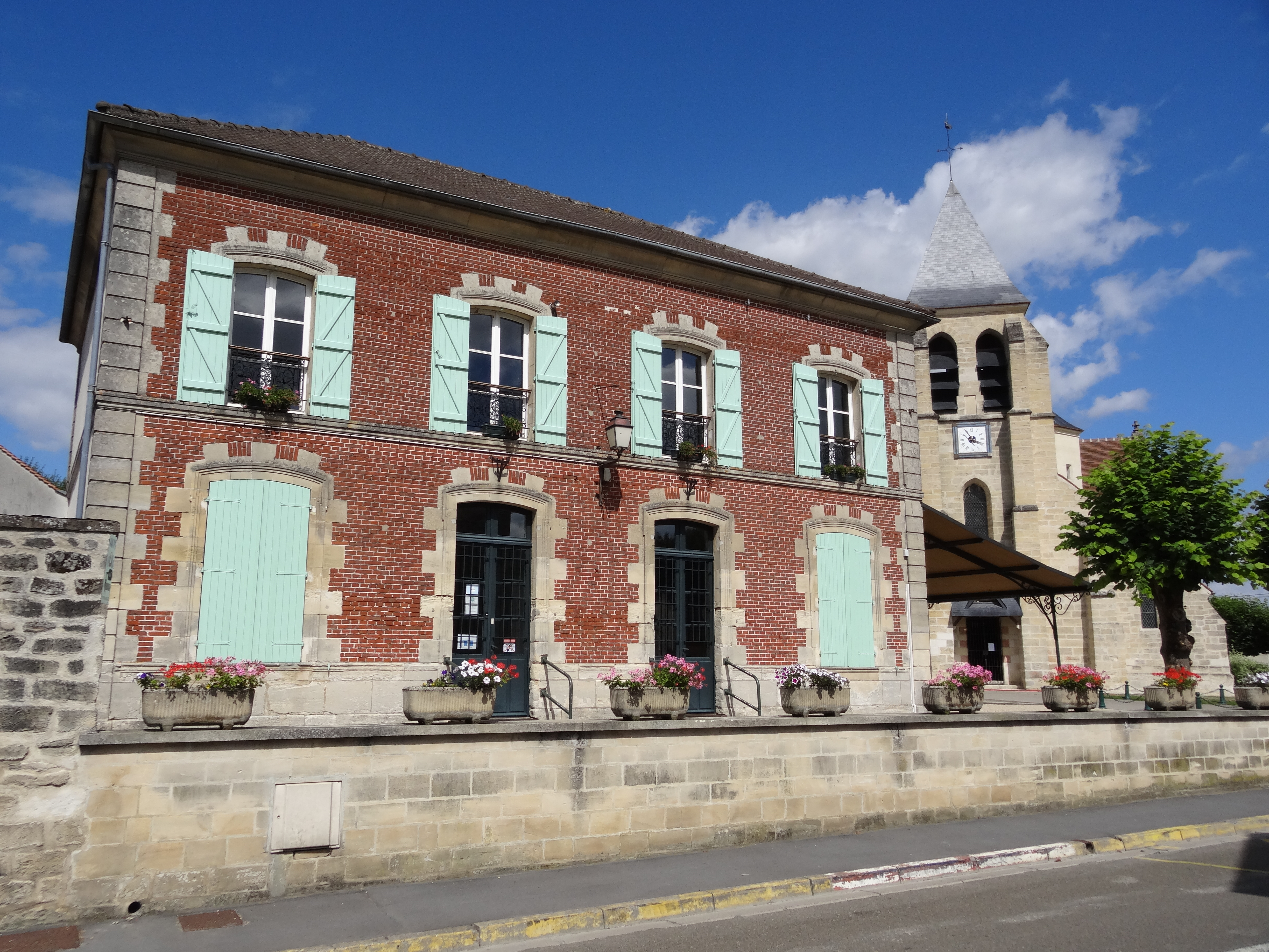 Ancienne mairie-école et église, RD 92.